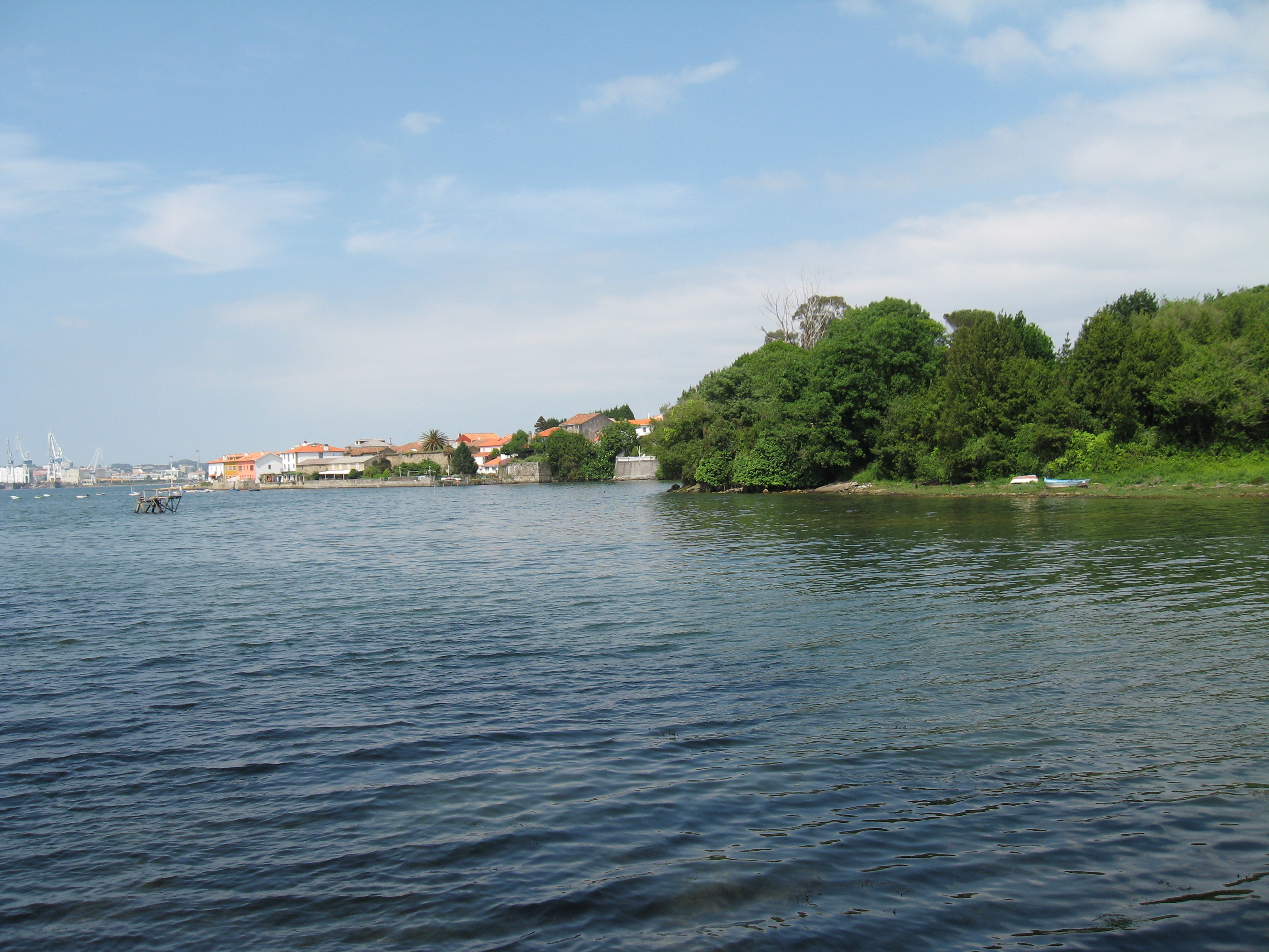 Beiramar de Mugardos com o Seixo e Ferrol ao fundo.